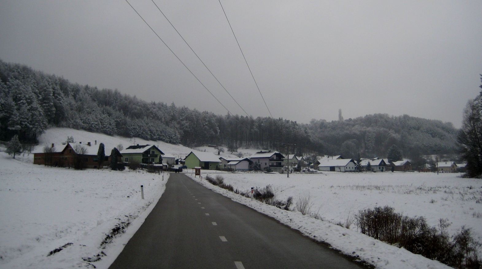 Trdkova, vilage at Goriško (Prekmurje), Slovenia